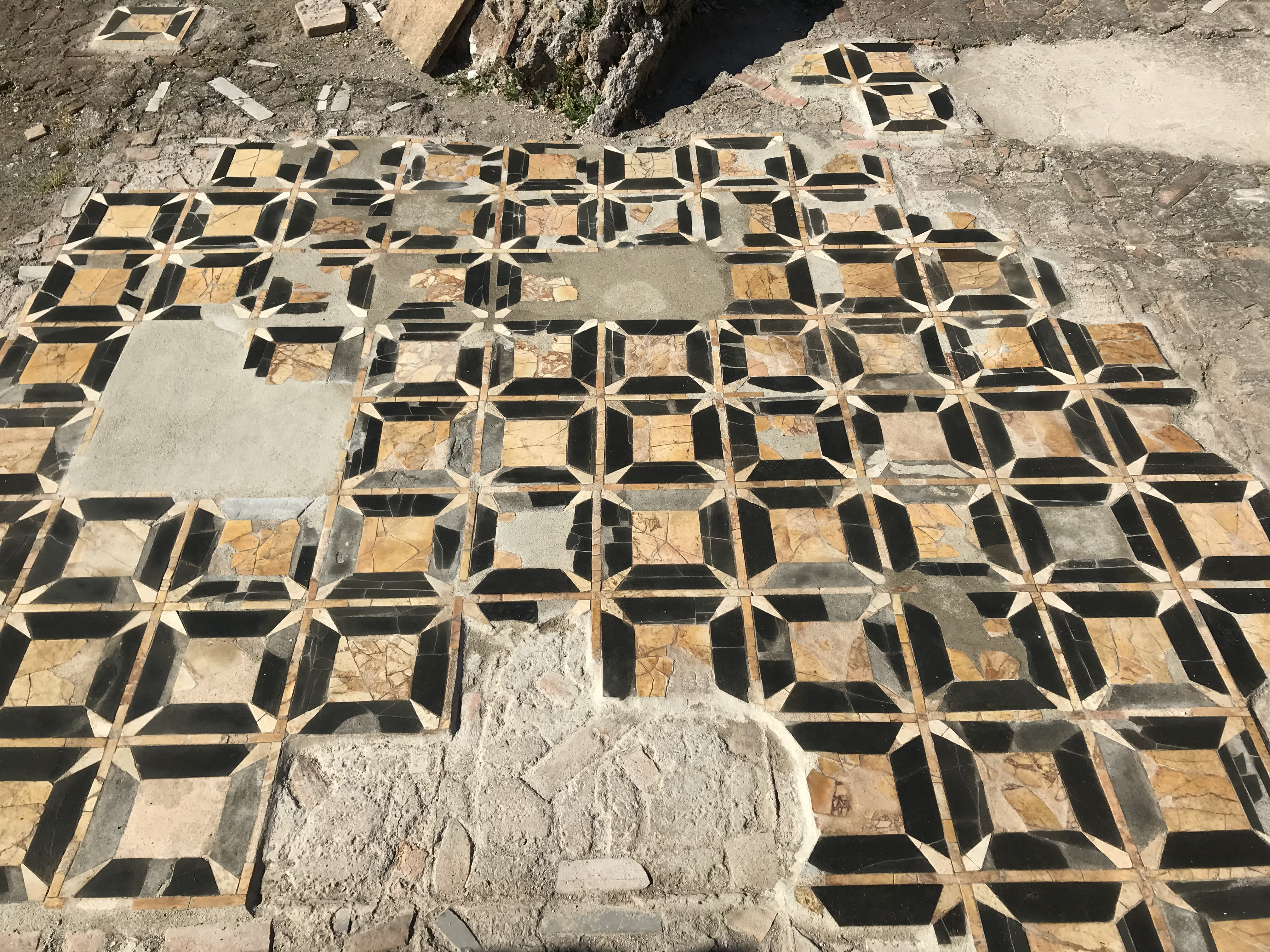 Villa dei Quintili This is a photo of a monument which is part of cultural heritage of Italy.